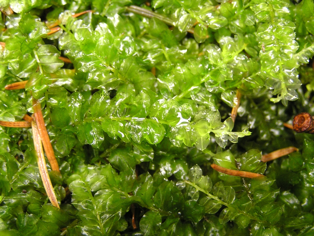 Plagiomnium affine auf Waldboden zwischen Kalenborn und Altenahr im Ahrtal.